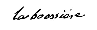 Signature de Antoine Texier La Boëssière in Henri Daressy, Archives des maîtres d'Armes de Paris, 1888, page 182